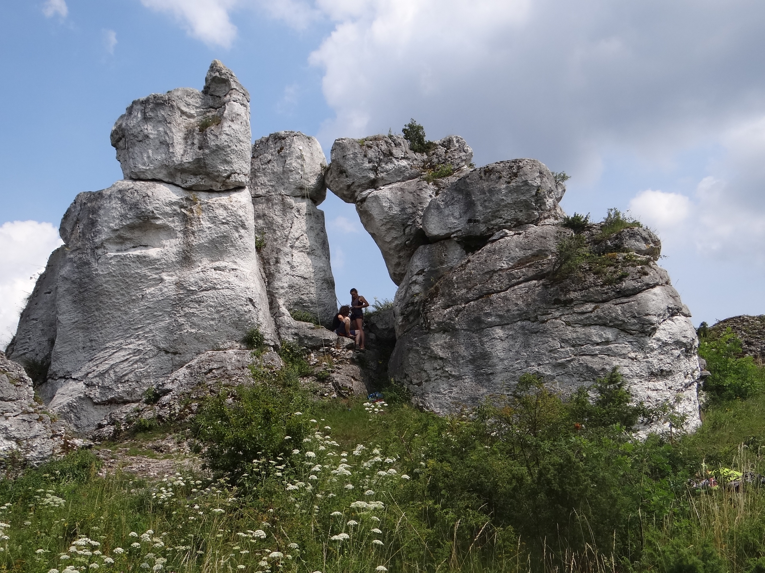 Góry Towarne Małe. Skały Bałwanek i Kogutek